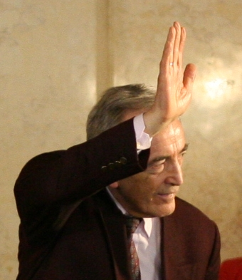 Alois Mock, "Mr. Europa" im Juni 2005 im Pallais Niederösterreich in Wien fotografiert